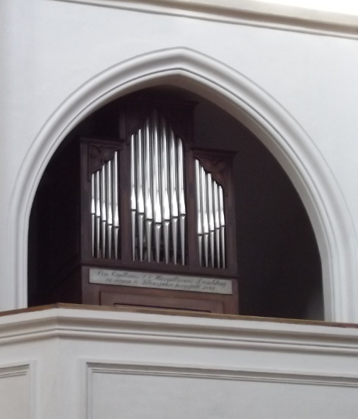 choir organ of Mariä-Himmelfahrt Landsberg (Lech)